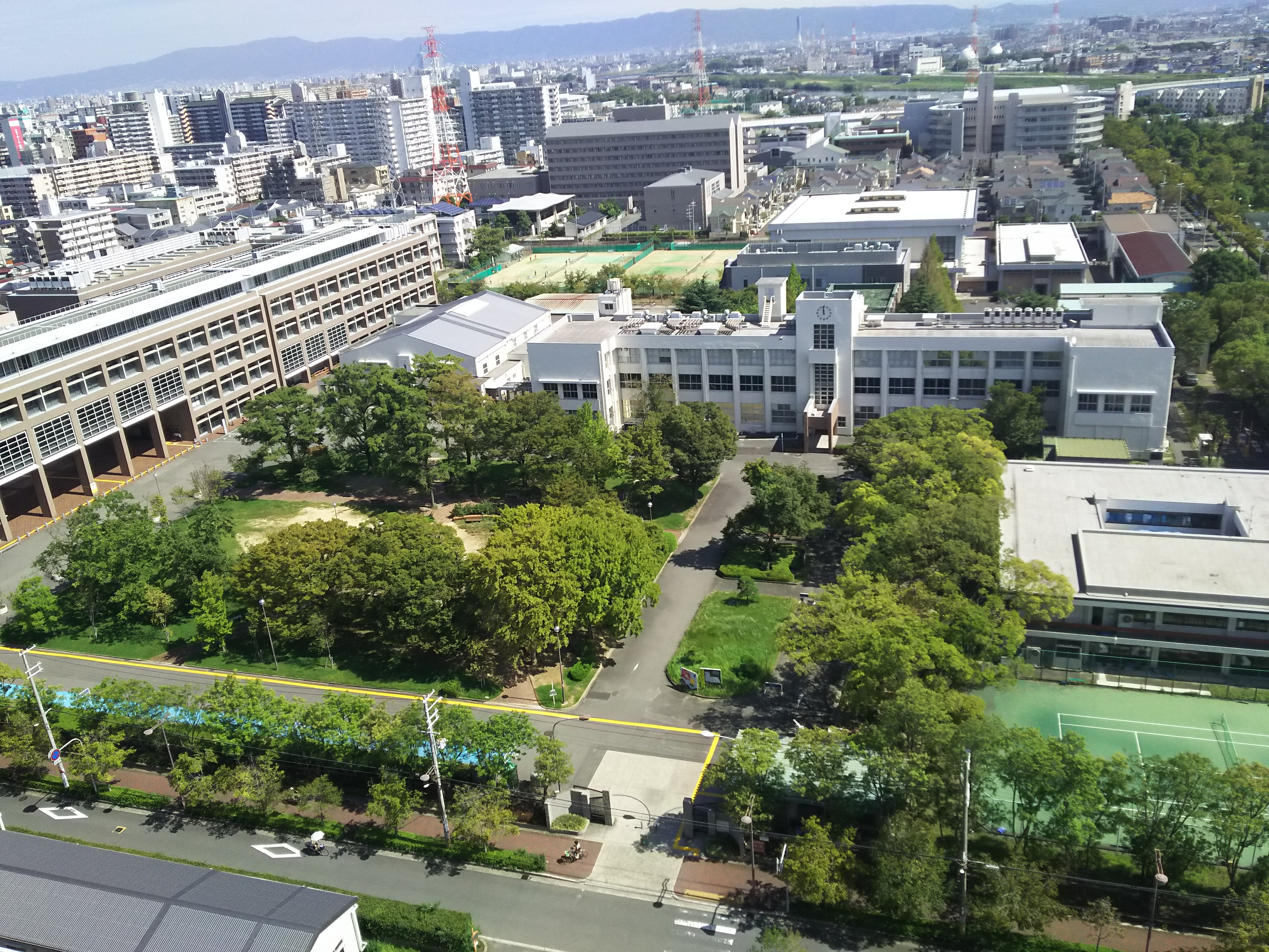 大阪市立大学杉本キャンパス旧教養地区（大阪市住吉区） 学術総合情報センター屋上から撮影